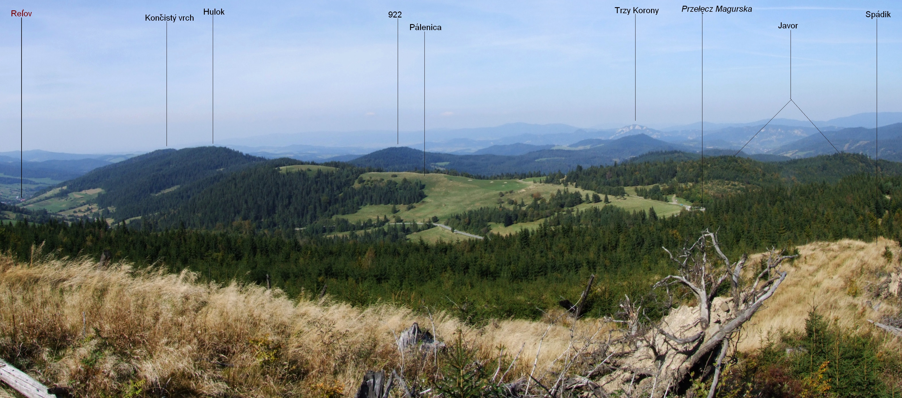 Magura Spiska. Widok z okolic szczytu Spadik na północ